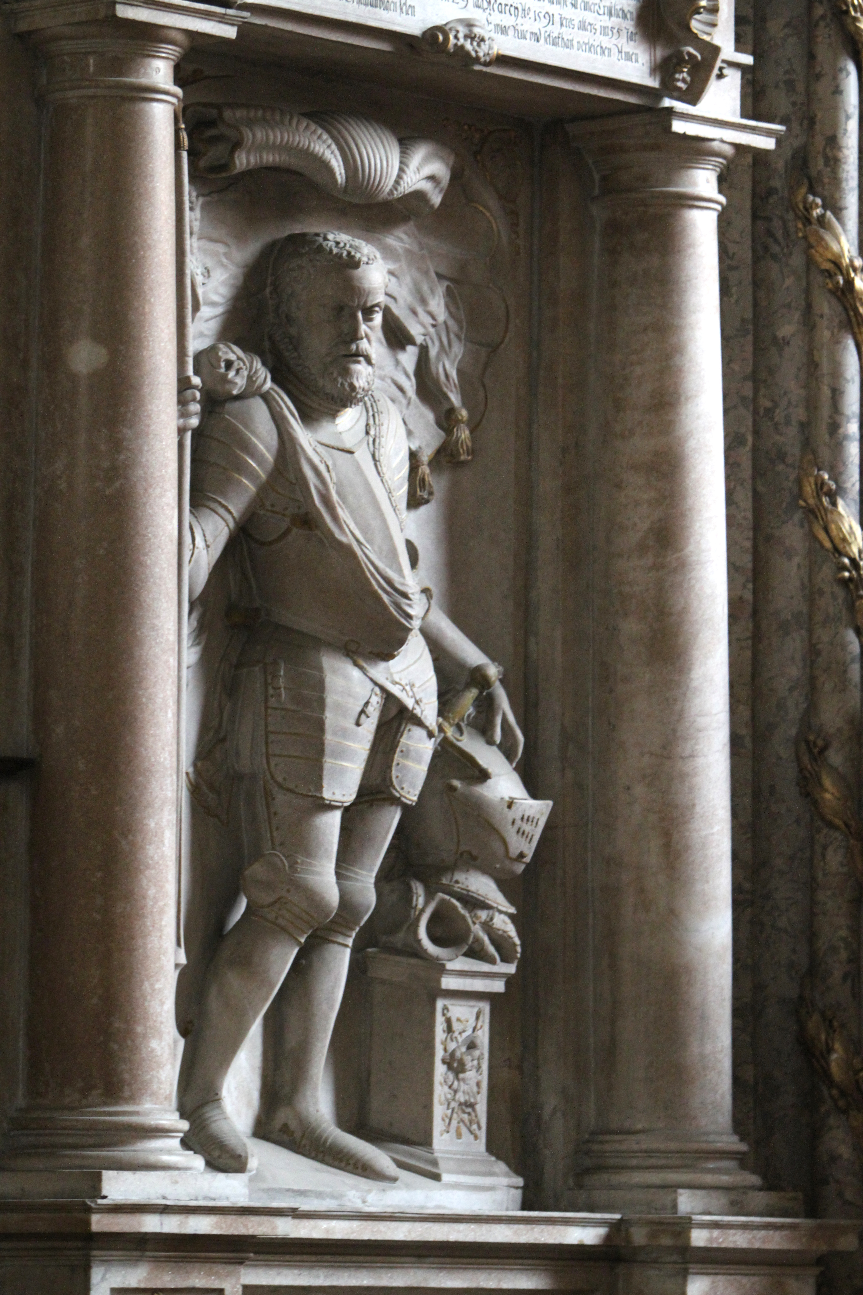 Epitaph des Peter von Mollard († 1576) im Altarraum der Michaelerkirche Wien